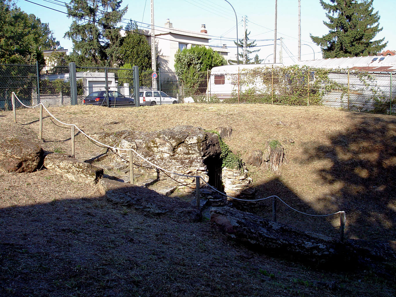 Allée couverte des Déserts, à Argenteuil (Val-d'Oise)